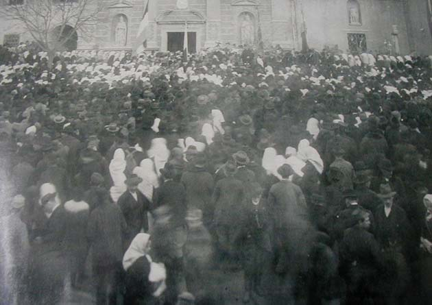 javna opća skupština 9. siječnja 1919. na trgu ispred franjevačke crkve u Čakovcu, na kojoj je donijeta Rezolucija o odcjepljenju Međimurja od Mađarske